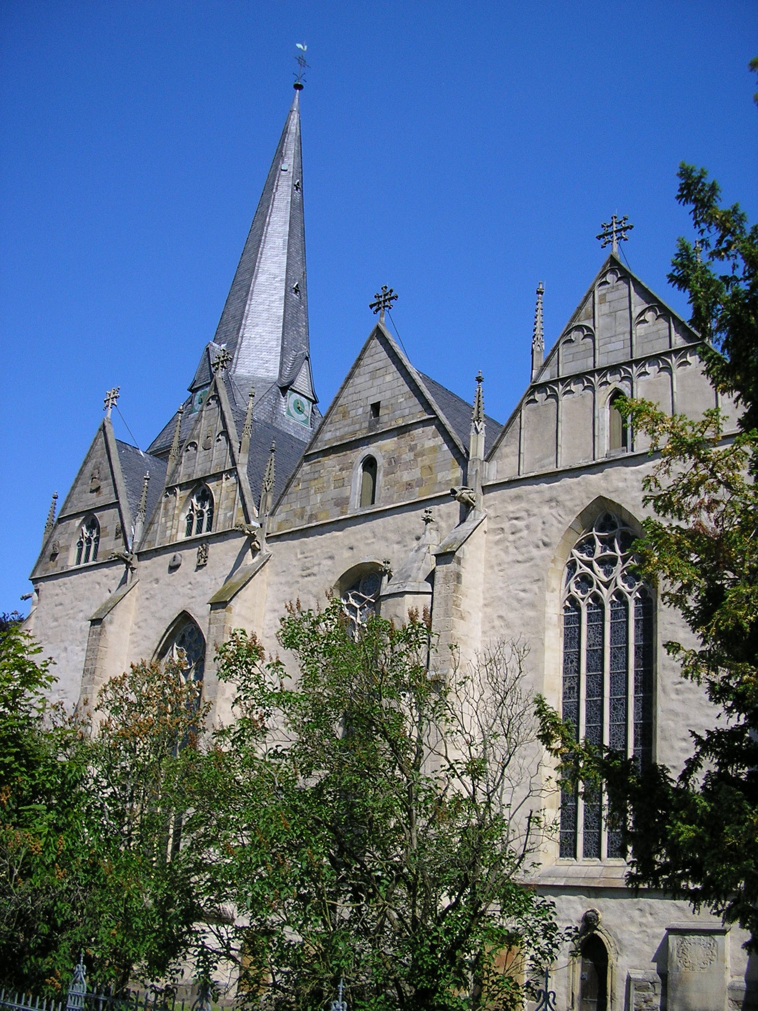 Evang.-luth. St. Marienkirche Stift Berg zu Herford